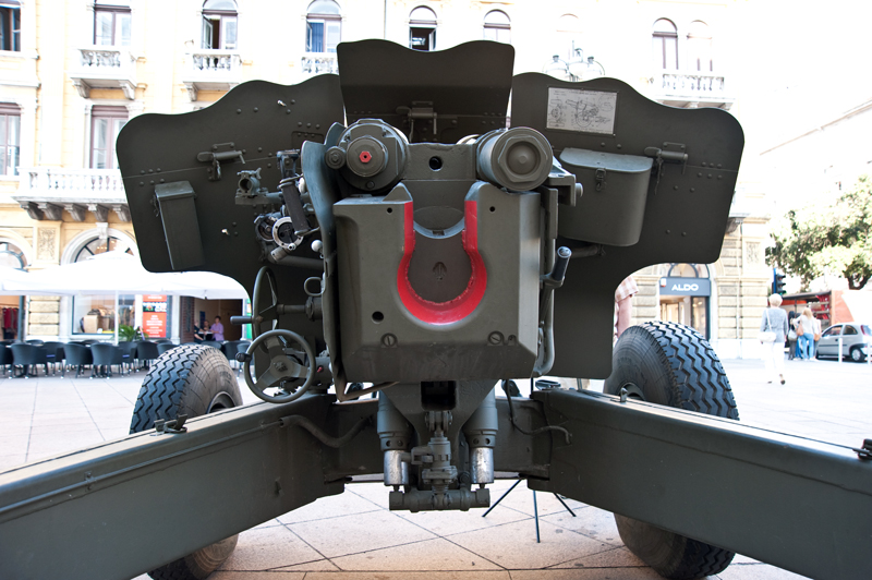 Izložba ratne tehnike iz Domovinskoga rata, iz fundusa Vojnoga muzeja MORH-a. Izložba se održava povodom dvadeset godina hrvatske neovisnosti i dvadesete obljetnice ustrojavanja Zbornog područja Rijeka.